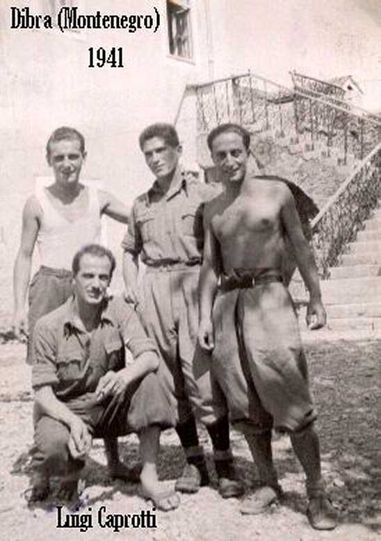 Luigi Caprotti 1941 Montenegro